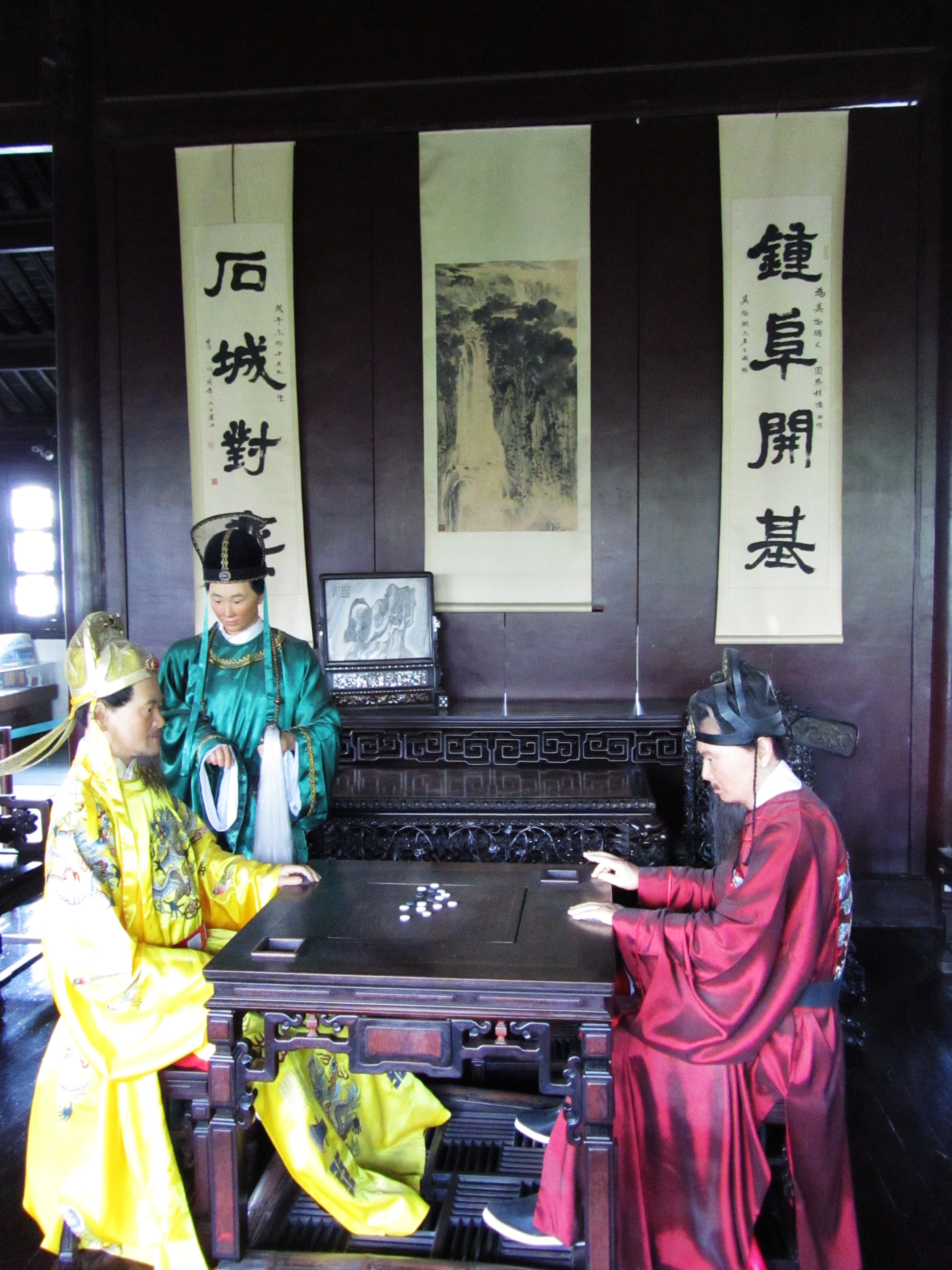 胜棋楼，室内朱元璋与徐达弈棋场景。